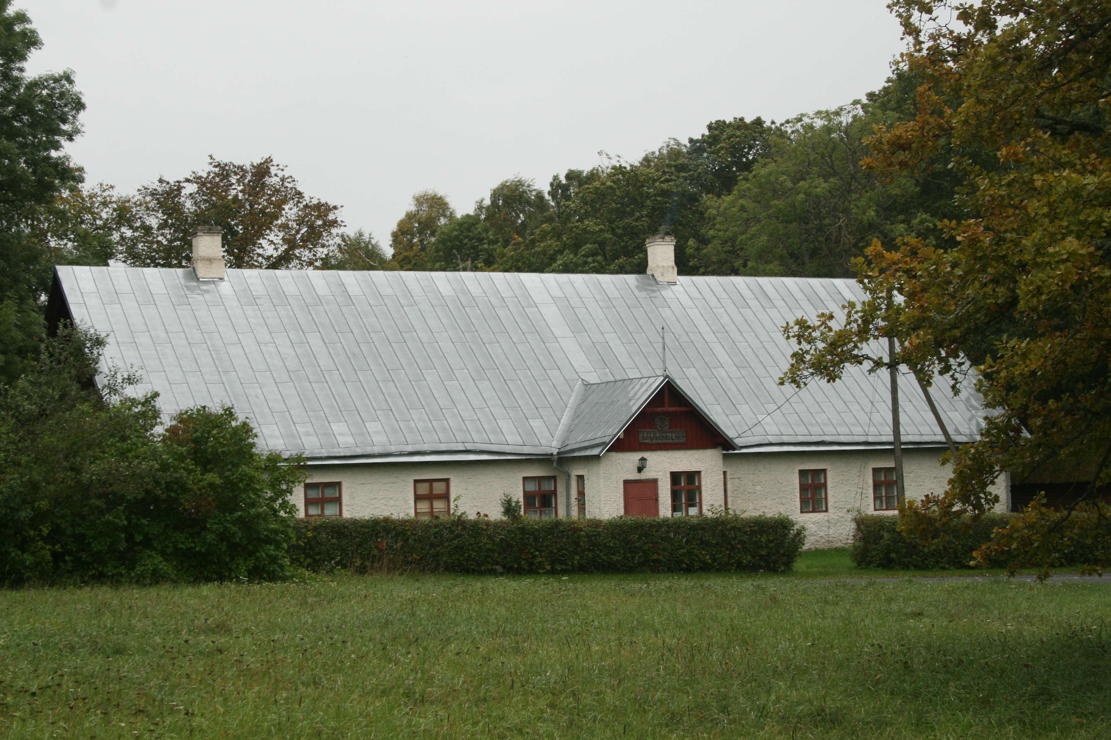 Hiiumaa, Käina vald. Kassari. Kassari mõisa valitsejamja.